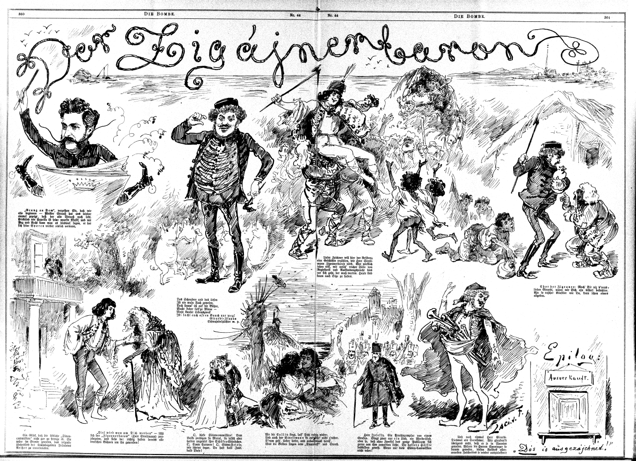 Dessin publié dans le magazine Die Bombe.